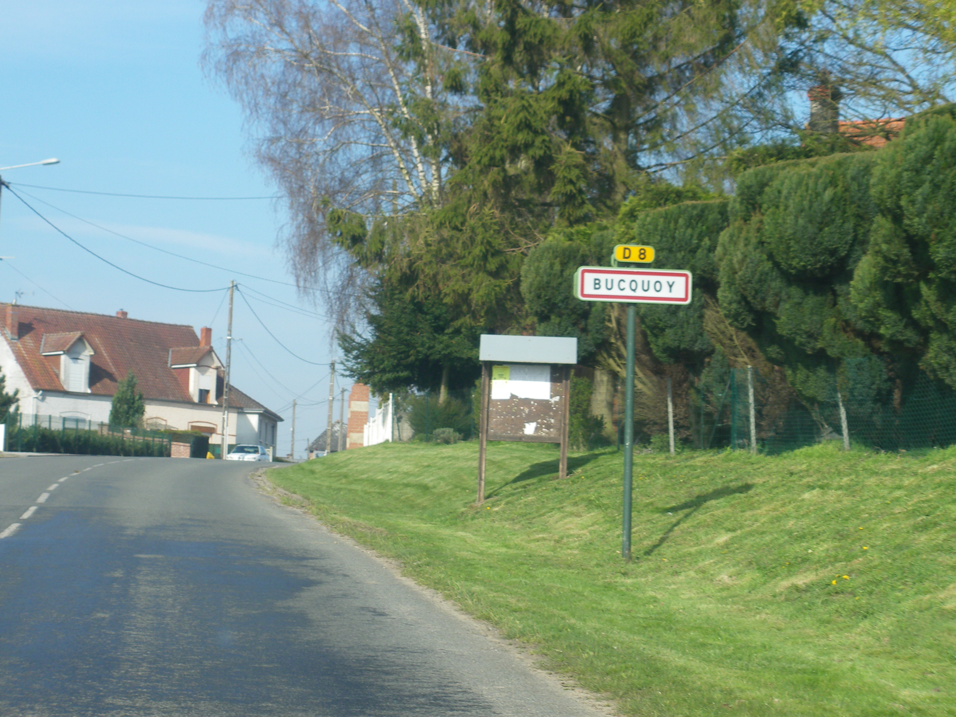 Vue d'une entrée de la commune de Bucquoy.